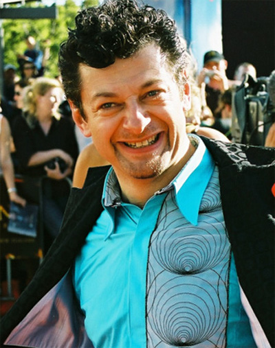 Andy Serkis bei der Weltpremiere des dritten Teils des Herrn der Ringe in Wellington (Neuseeland)